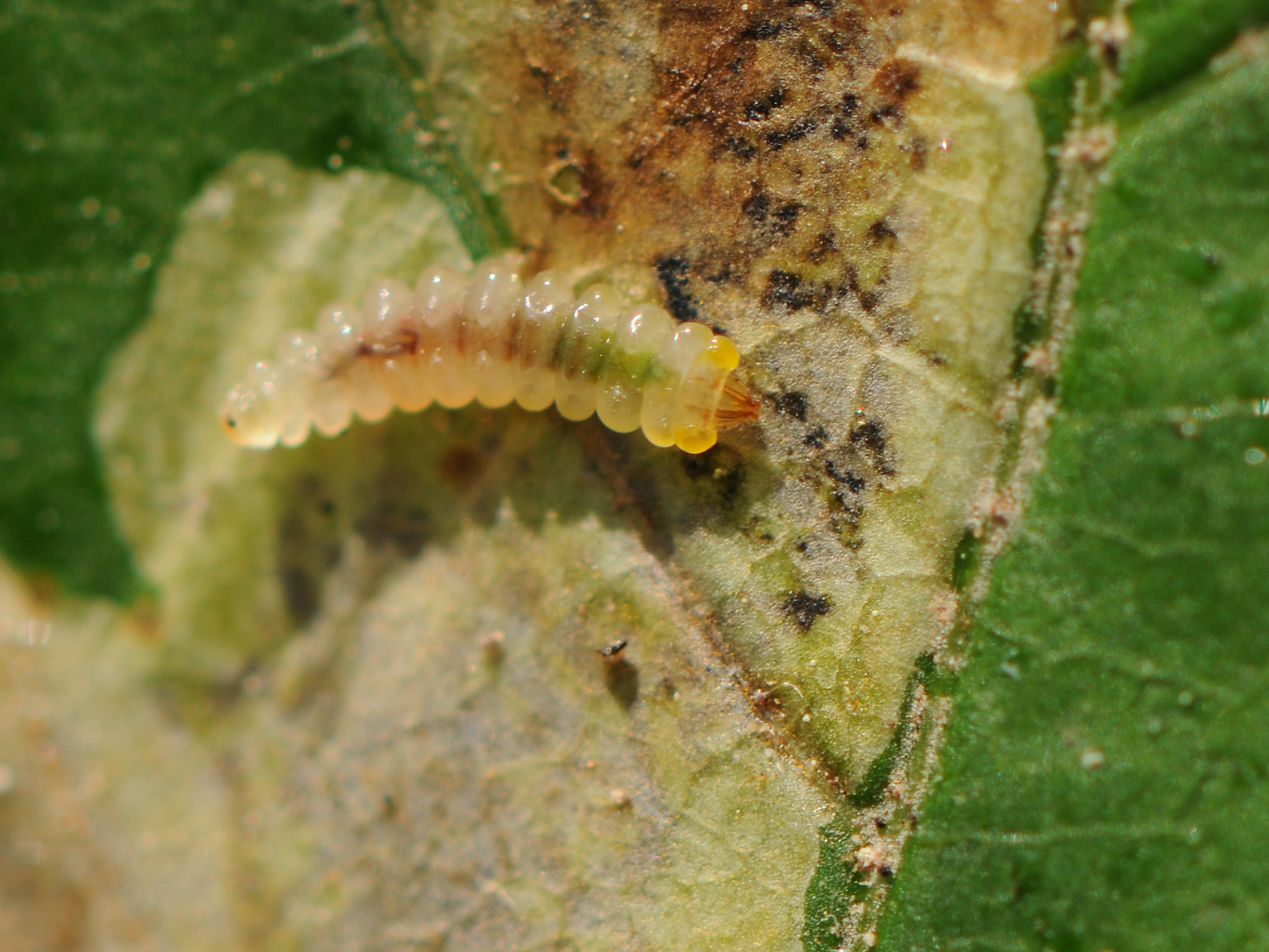 Cameraria ohridella Hipokastana folioborulo